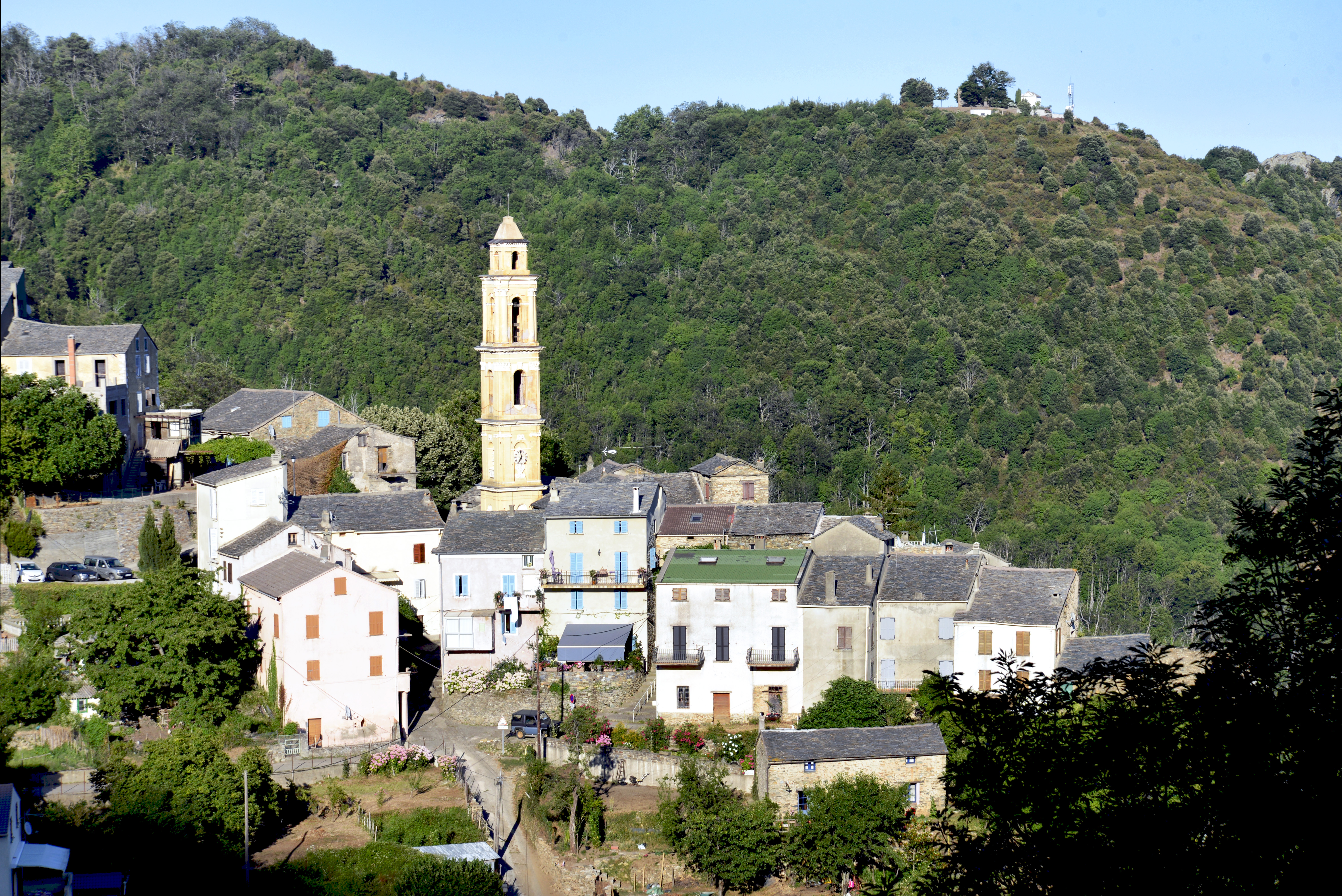 Silvareccio, Castagniccia (Haute-Corse) - Vue du village en Ampugnani, avec le clocher de l'église paroissiale Saint-Sébastien (XVIIe siècle).